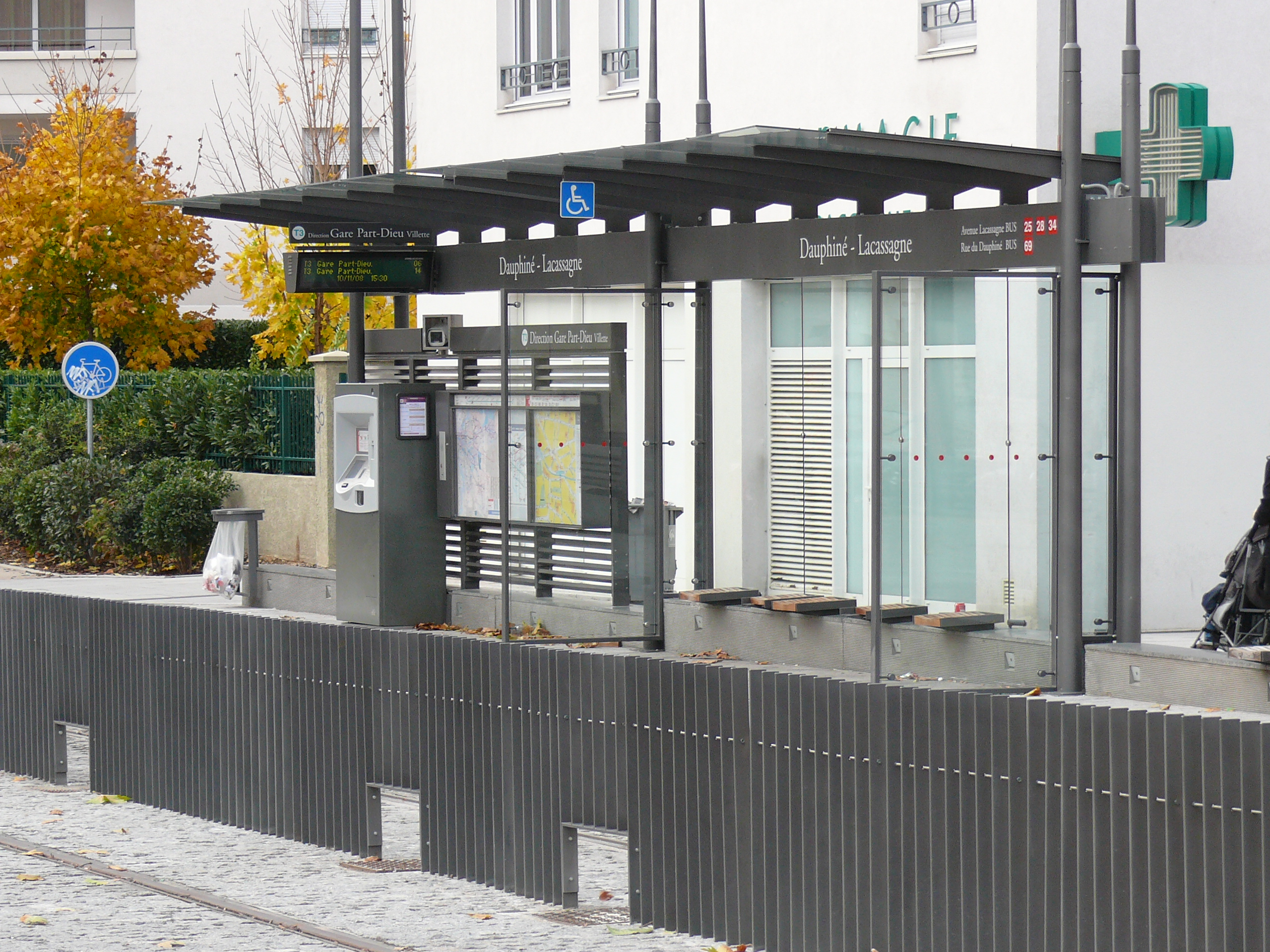 Mobilier de la station Dauphiné - Lacassagne de la Ligne 3 du tramway de Lyon conçu par l'agence Gautier+Conquet